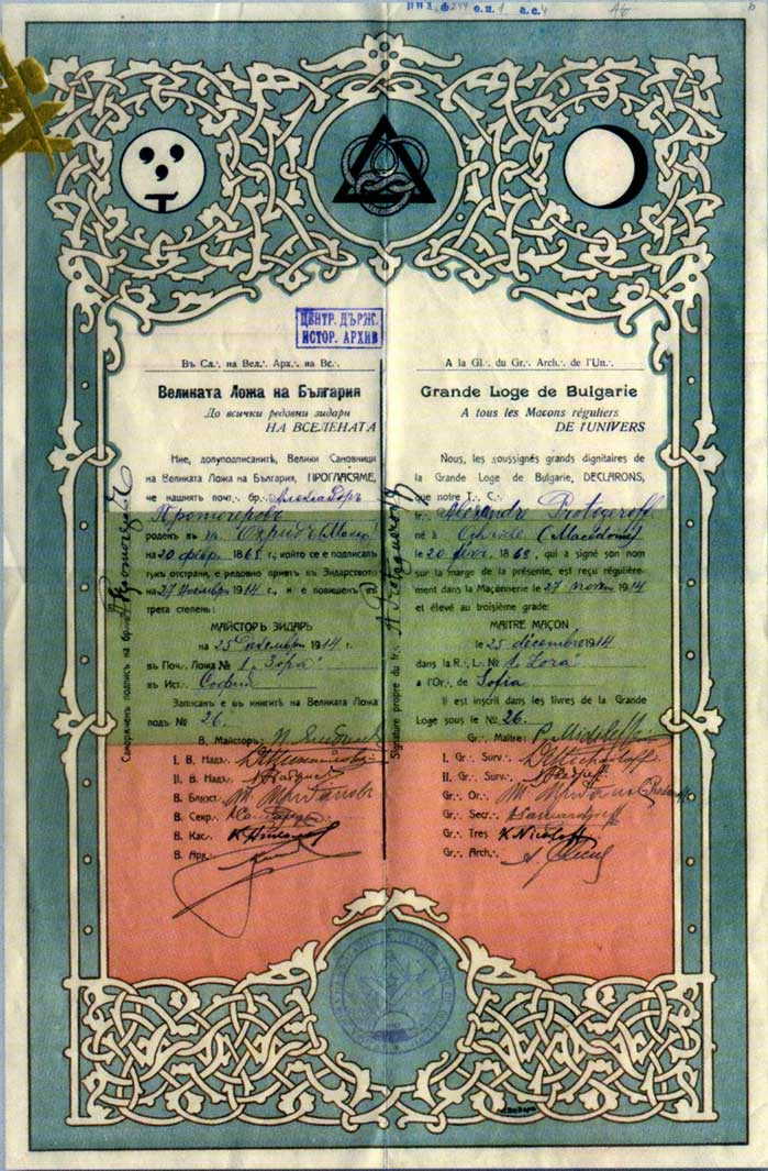 Удостоверение за членство от Великата ложа на България на генерал Александър Протогеров.